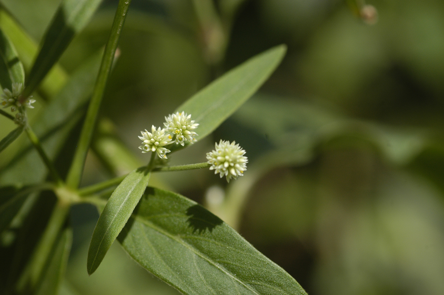 Paratudo, Ginseng brasileiro (Pfaffia glomerata)